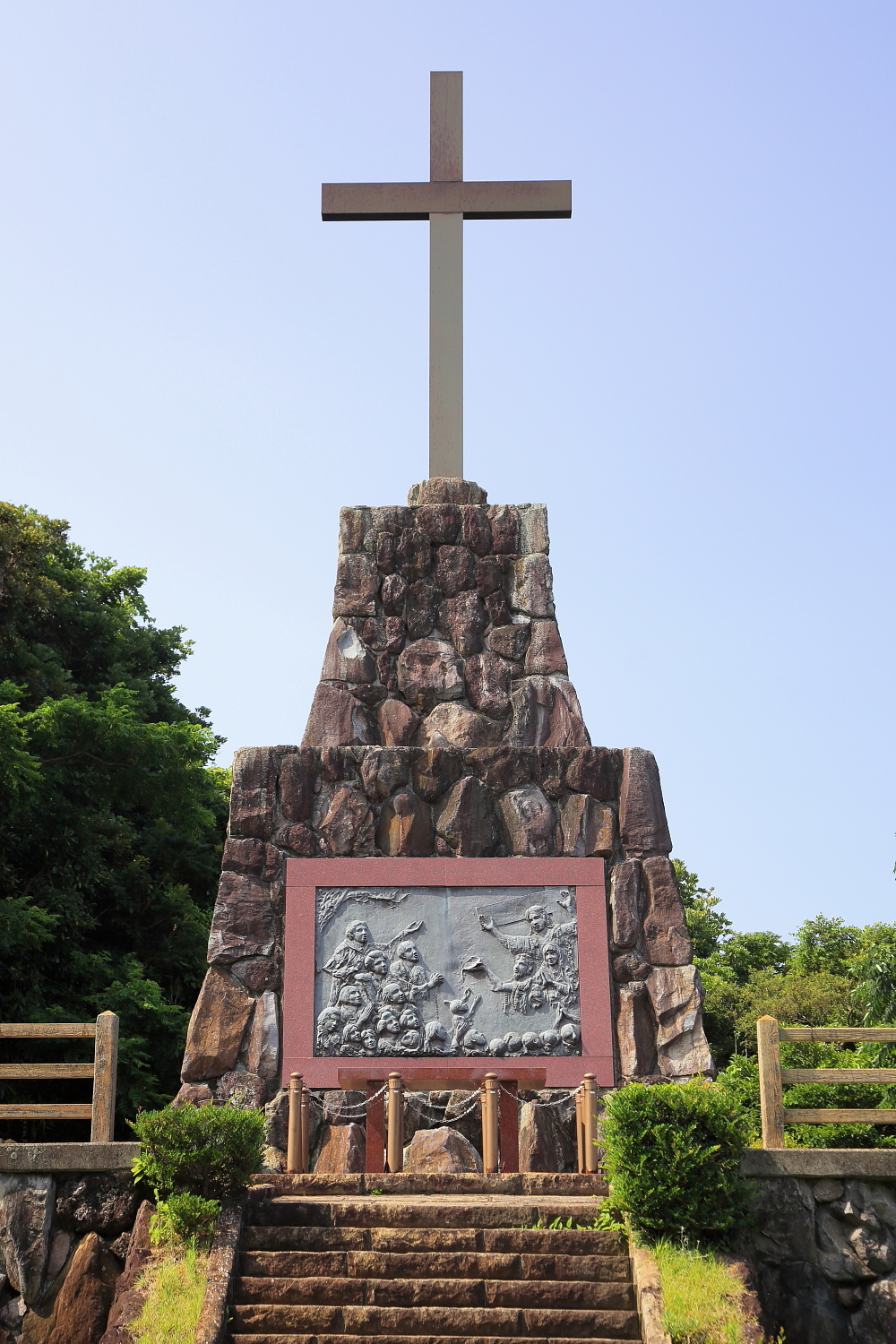 黒瀬の辻殉教地（ガスパル様）（平戸市生月町、2014年（平成26年）7月）